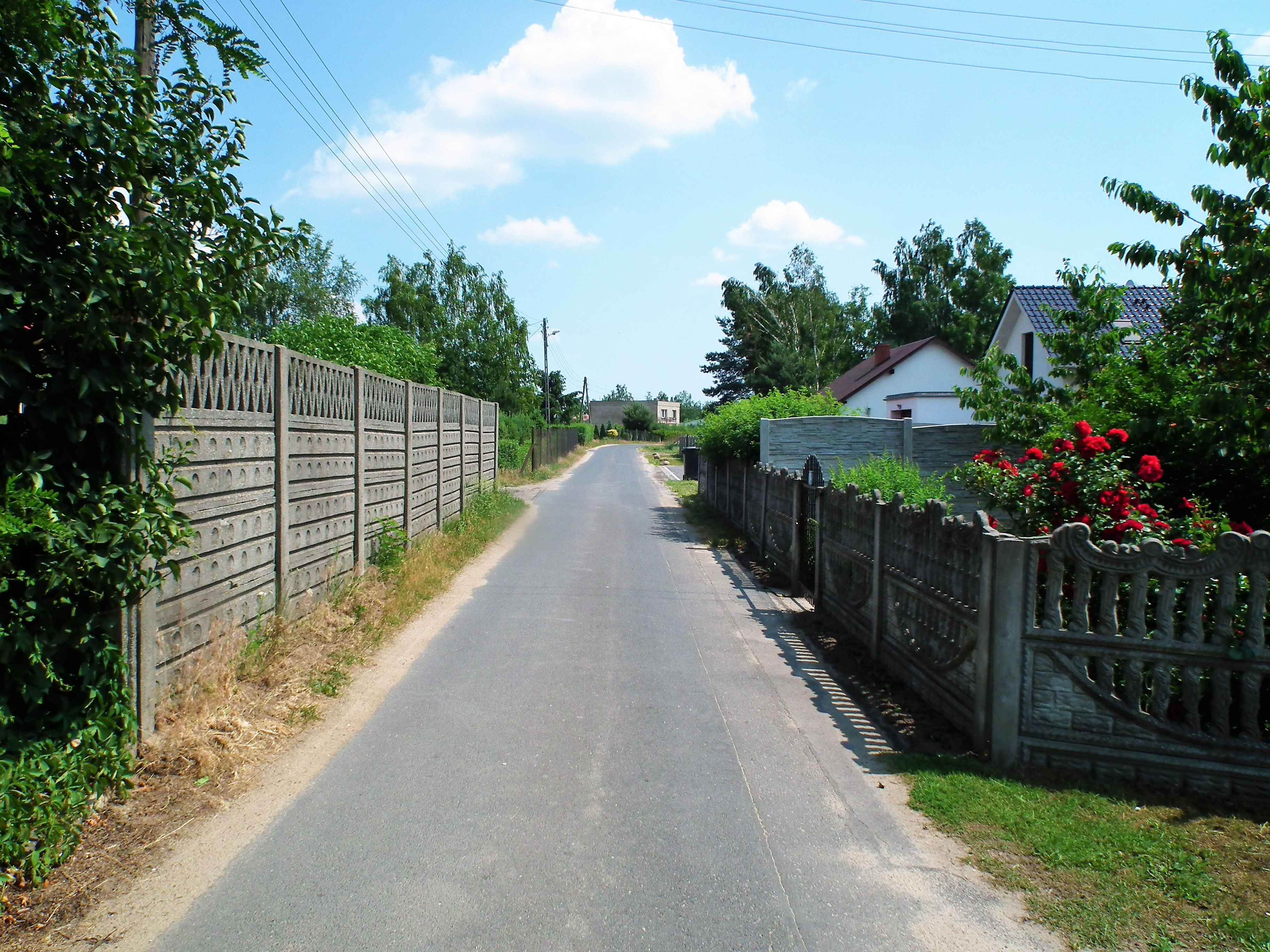 Wieś Nowy Folwark koło Wrześni.